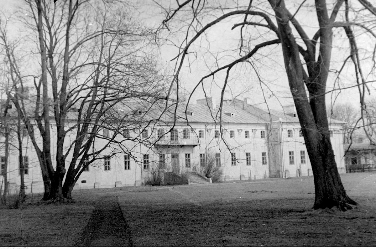 Броди Палац Потоцьких початок XIX ст